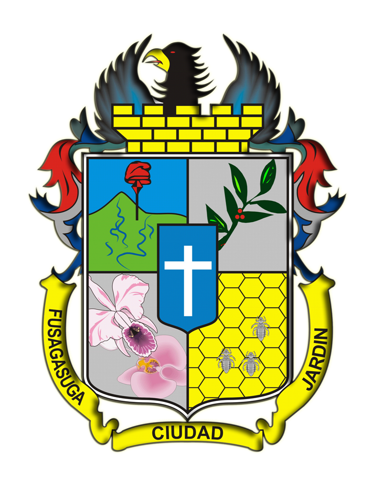 El escudo de Fusagasugá esta compuesto por cuarteles iguales en cruz. Al centro, una égida o escudón adornado por una ondeante cinta dorada. Encima, una águila de los Andes, símbolo de generosidad, nobleza e hidalguía, extiende sus alas y mira a la derecha. El cerro del Fusacatán, que domina el oriente de la ciudad, y los dos ríos más importantes: el Sumapaz y el Cuja, fuentes de riqueza. Al pie del cerro, el asta de una lanza enarbola el gorro, símbolo de la libertad. Sobre fondo plateado, dos flores simbolizan la belleza de la flora tropical. La orquídea es la flor nacional y particularmente la flor fusagasugueña. El clima favorece cultivar flores en las más apreciadas y diversas especies. Sobre fondo plata, emblema de pureza y transparencia, unas ramas de cafetos cargados de rojos frutos representan la riqueza de la tierra y una importante actividad de sus habitantes. Sobre fondo dorado, simulando las celdas de un panal, las abejas laboran, como símbolo de la actividad, espíritu de trabajo y empuje de los moradores. ​Ondea una cinta esmaltada en oro la leyenda: "FUSAGASUGÁ CIUDAD JARDIN" como el país la identifica.